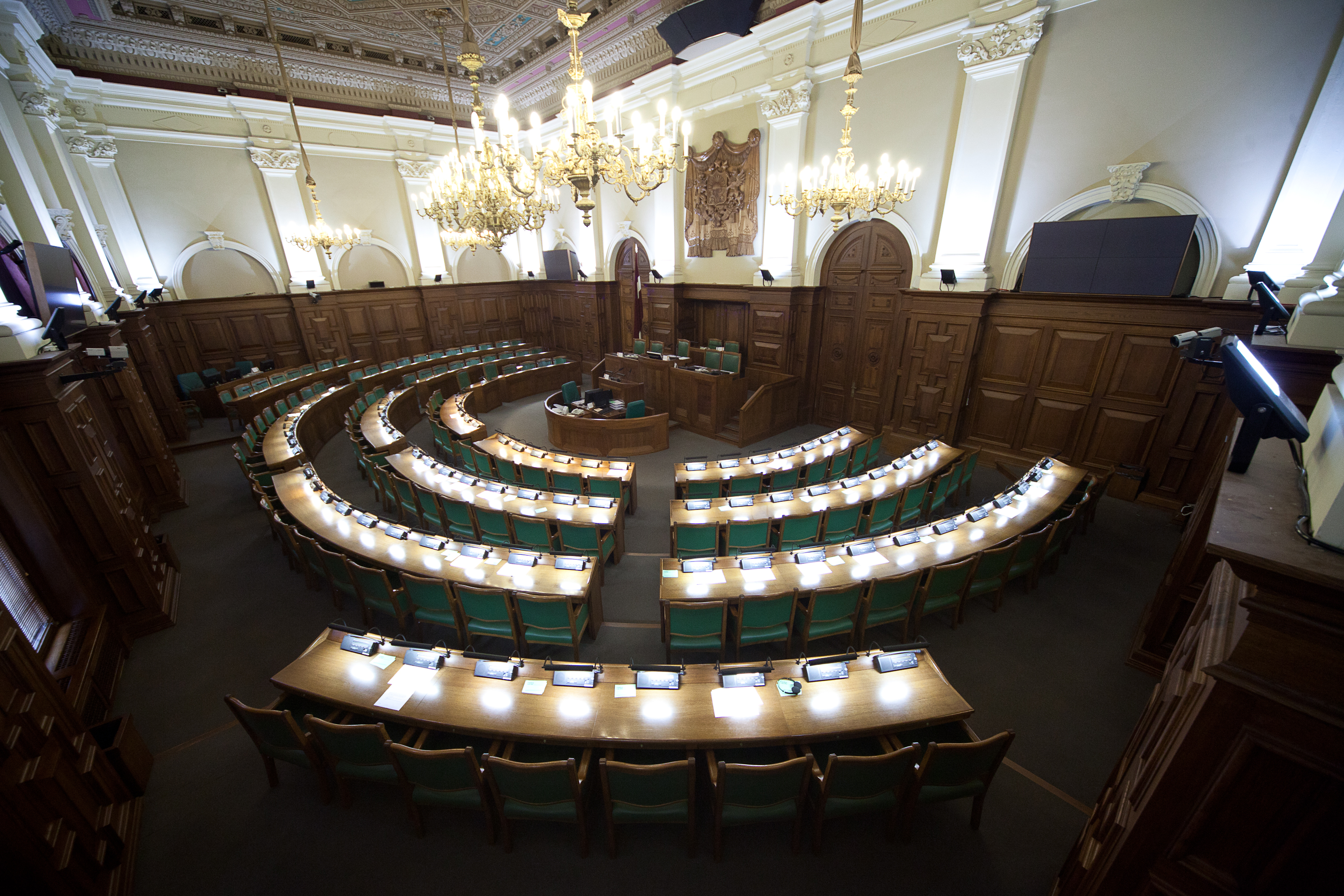 Foto: Ernests Dinka, Saeimas Kanceleja